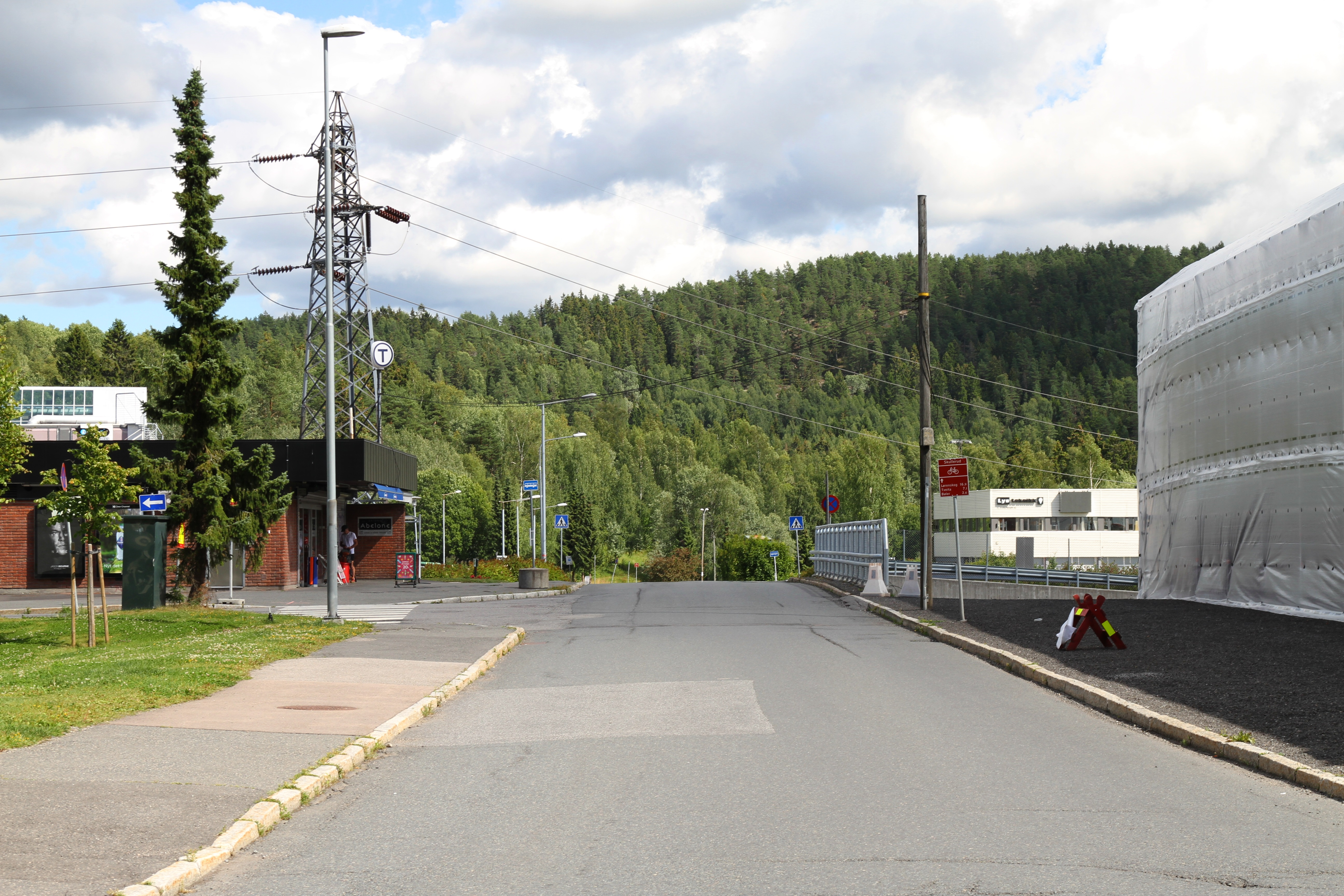 Olaf Helsets vei i Oslo.